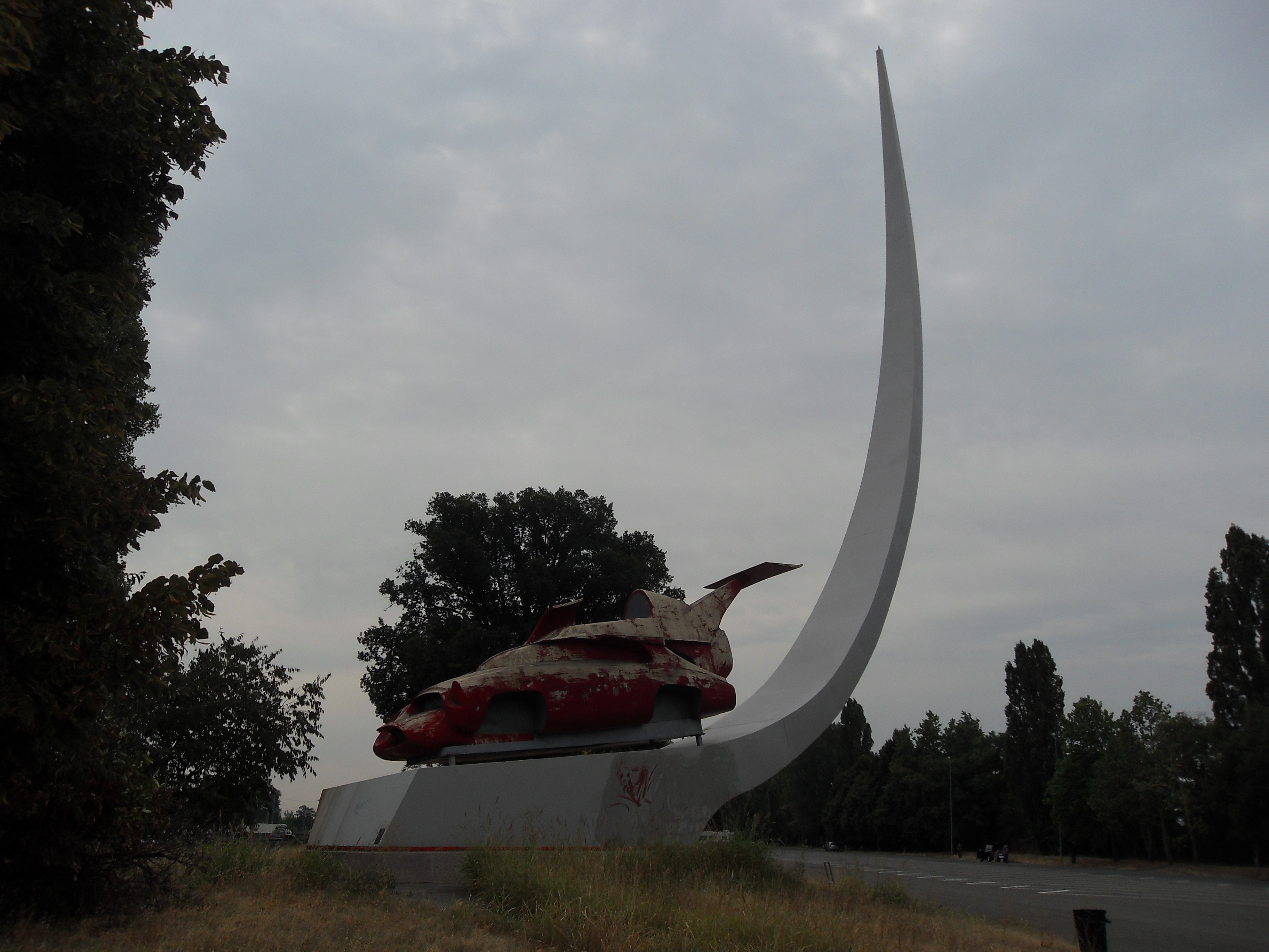 Monumento "Ferrari Evoluzione" di Franco Reggiani